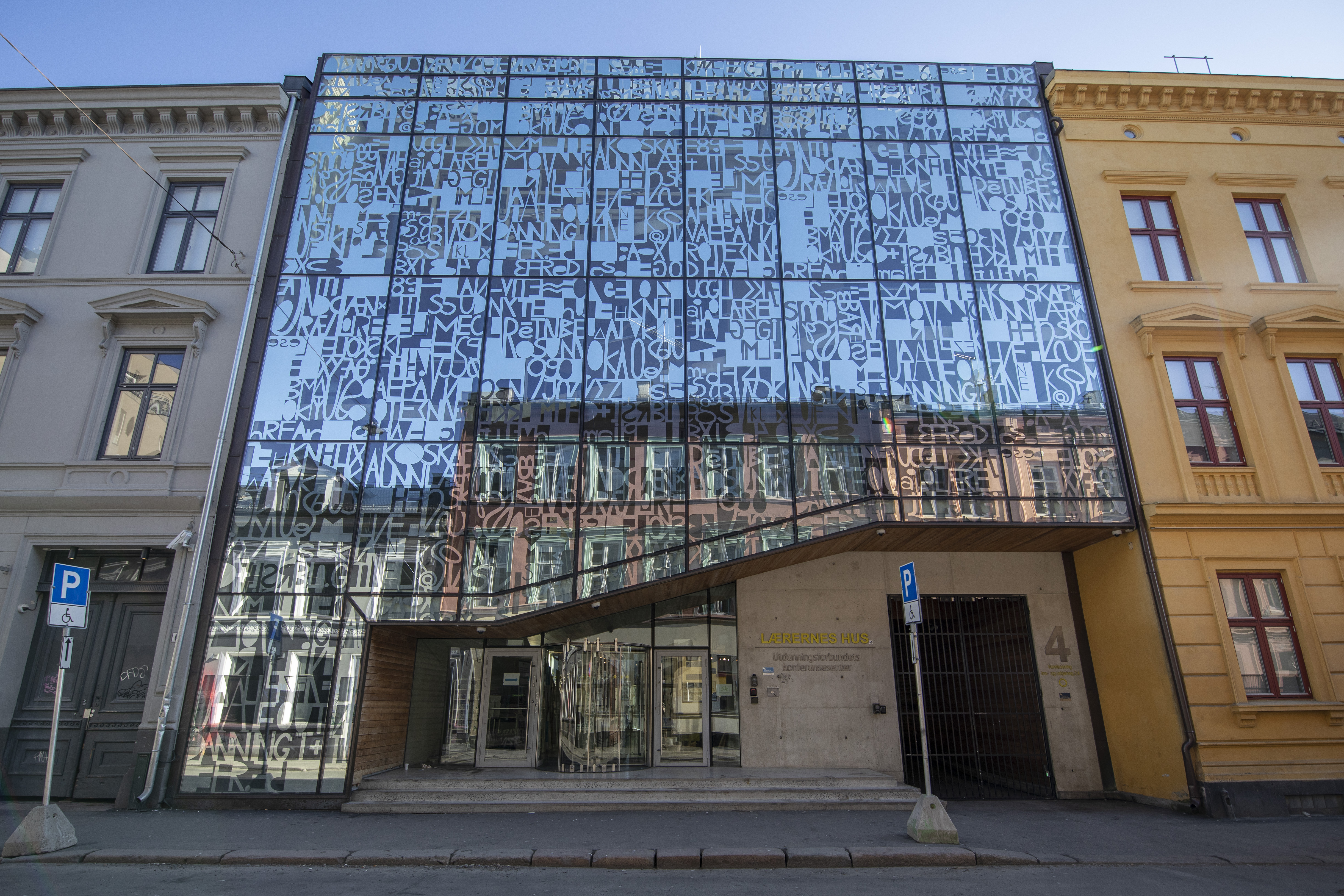 Fasaden til Utdanningsforbundet konferansesenter, også kjent som Lærernes hus.